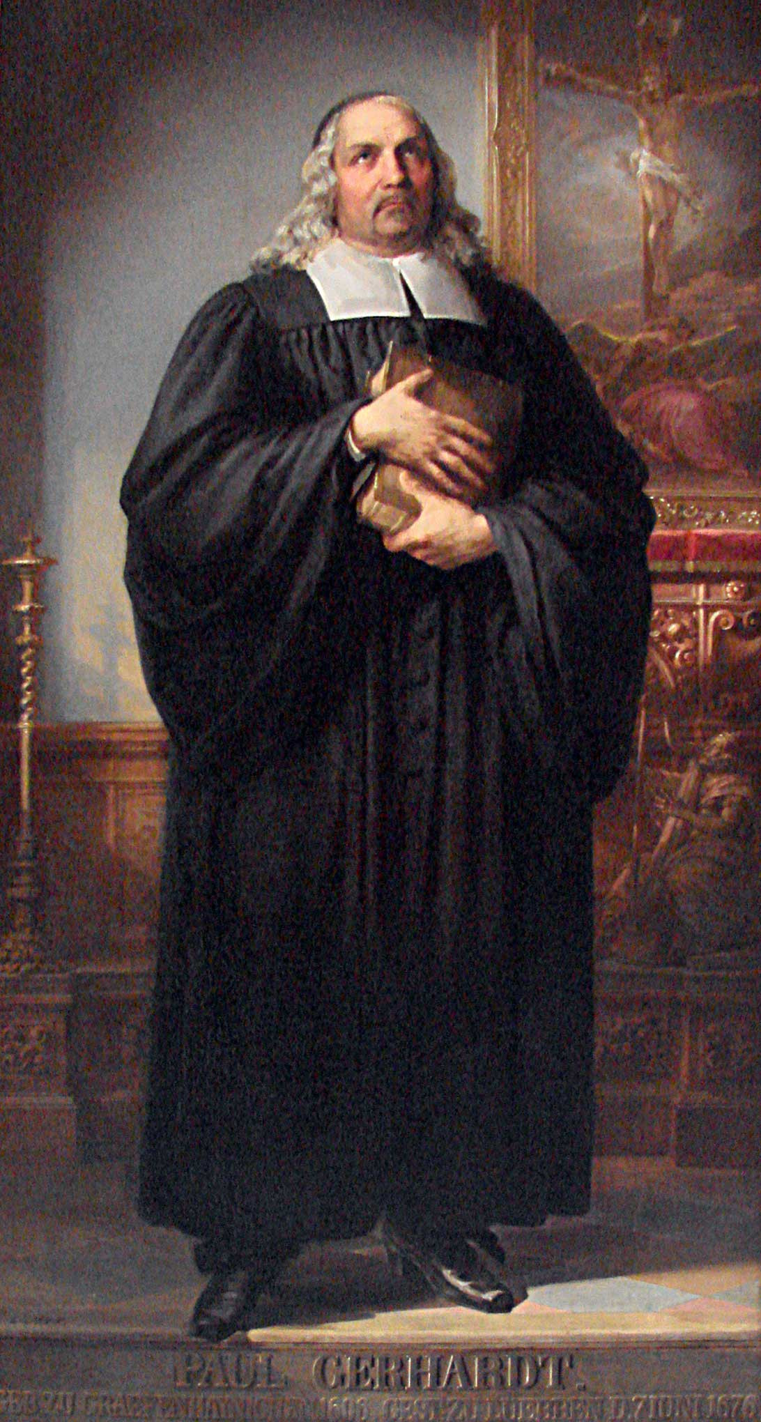 (Postumes) Portät Paul Gerhardt (Gemälde, Geschenk von Friedrich Wilhelm IV. zur Einweihung der Paul-Gerhardt-Kapelle)